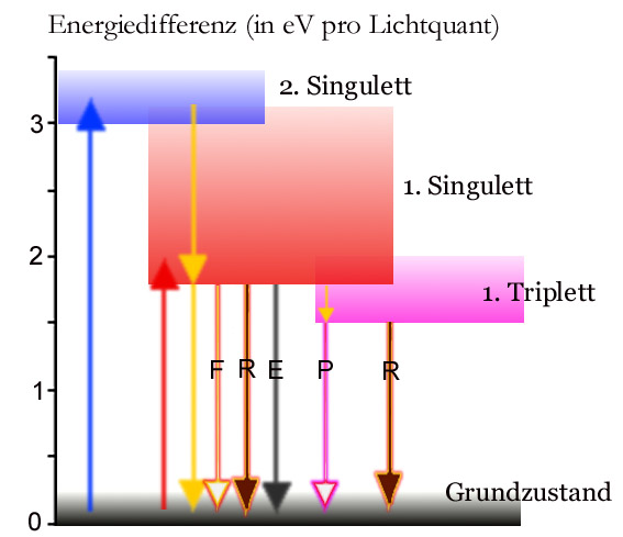 Termschema Chlorophyll a; selbst erstellt